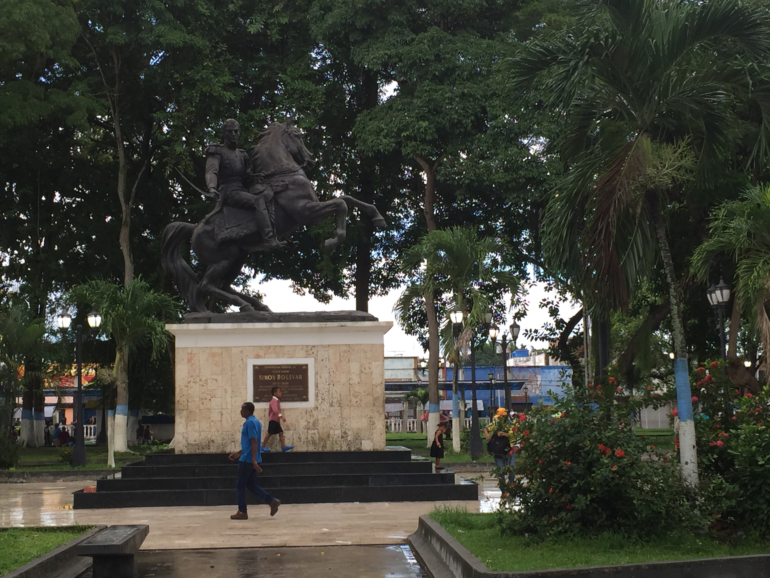 Plaza Bolívar de Tucupita, capital del estado Delta Amacuro, Venezuela.